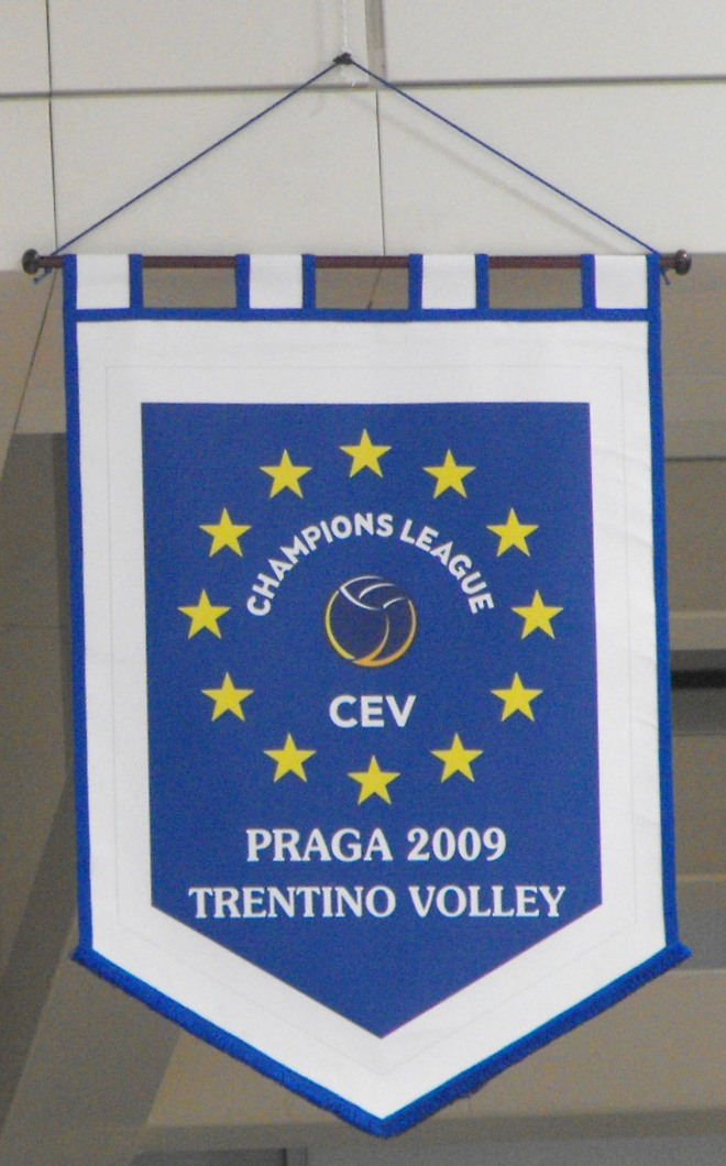 Gonfalone appeso al PalaTrento, in ricordo della vittoria della Champions League di pallavolo 2008-2009, vinta dalla Trentino Volley